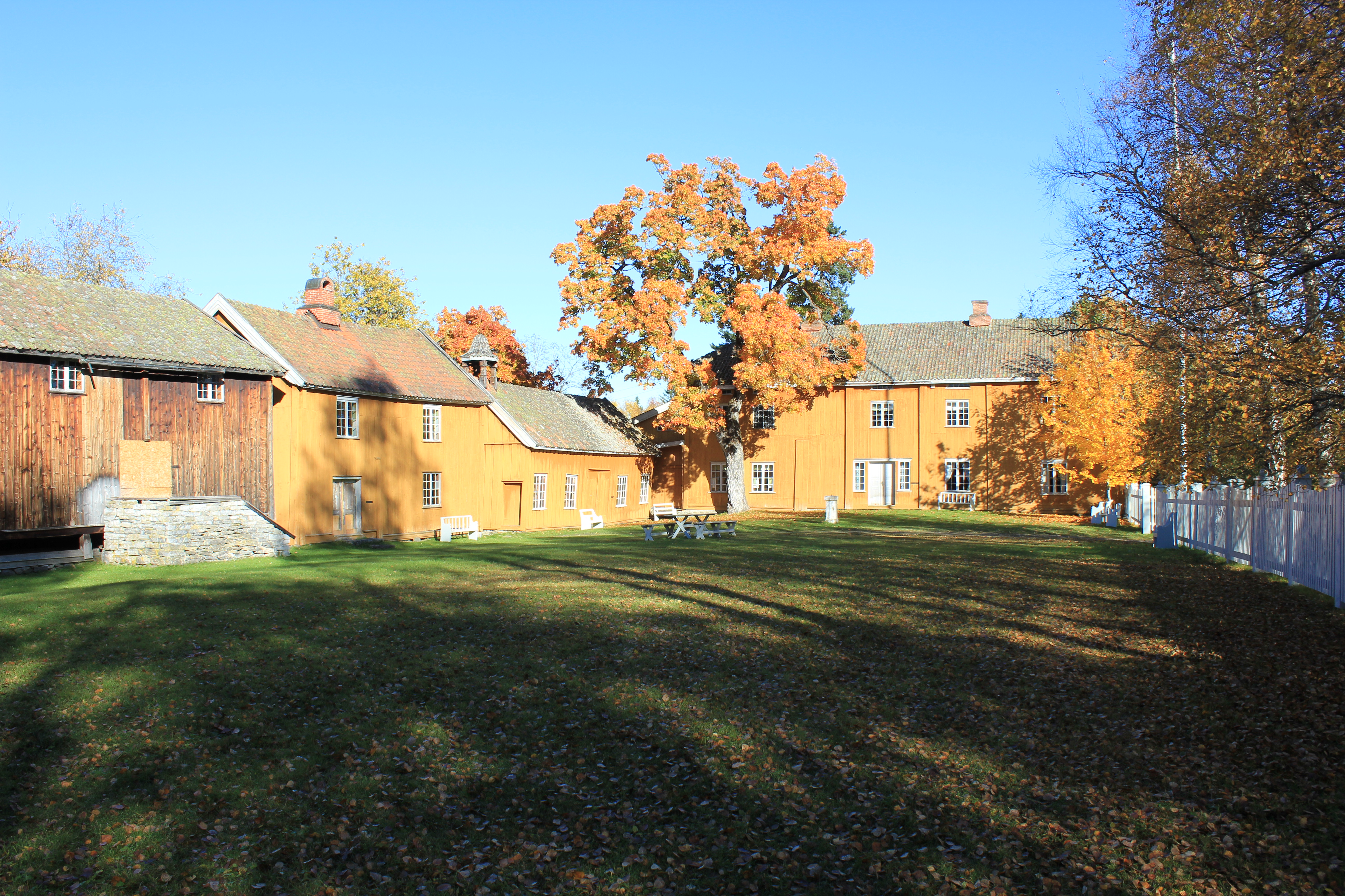 Amtmannsgården på Steinberg museum, Toten, Oppland.